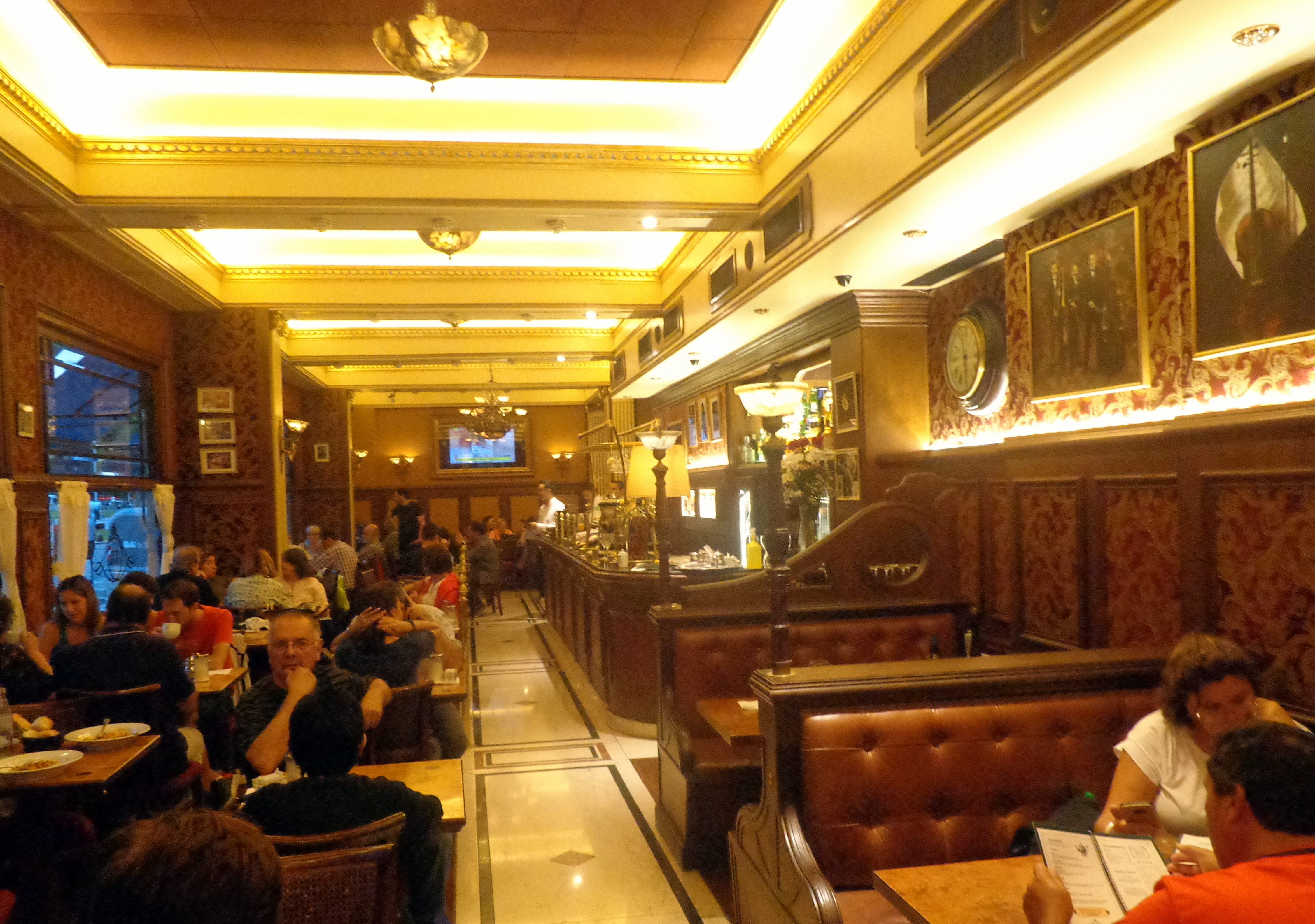 Petit Colón es un café y confitería notables situado en la esquina de las calles Lavalle y Libertad (Libertad 505), junto a la Roque Sáenz Peña (Diagonal Norte) en la ciudad de Buenos Aires, Argentina.